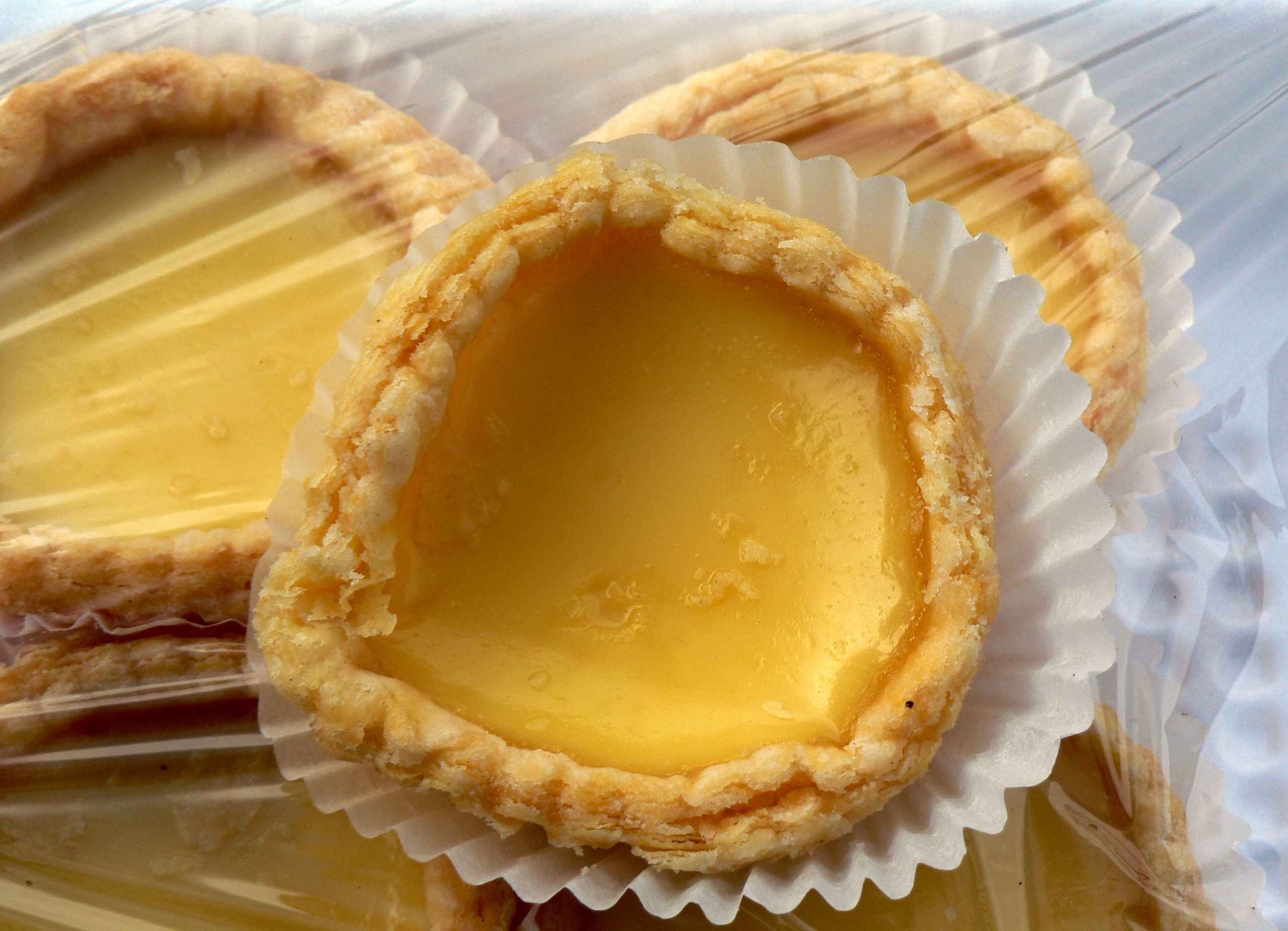 Egg custard tart